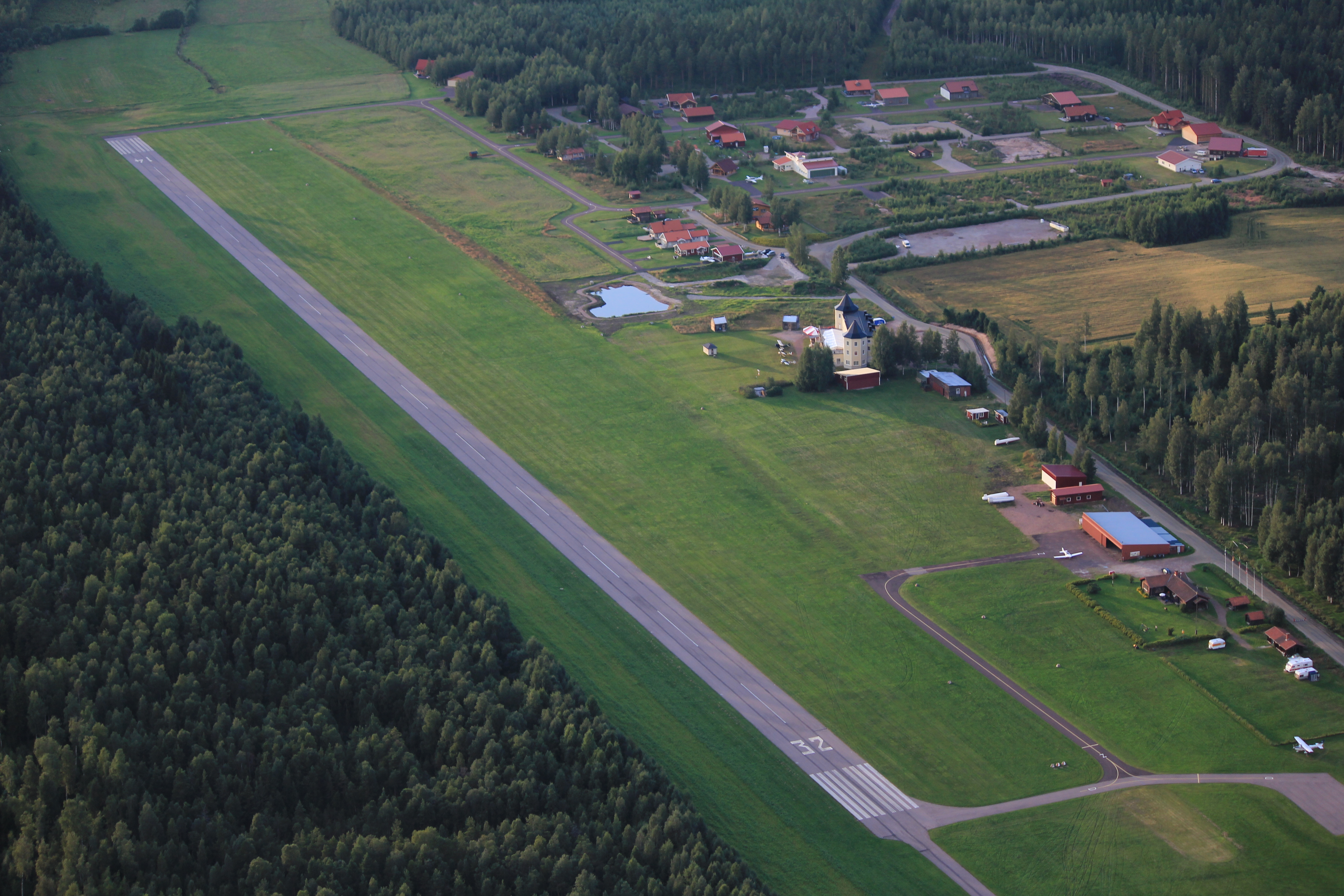 Flygfoto över Siljansnäs flygfält, Leksands kommun, Dalarnas län, Sverige This aerial photograph has been approved for publishing by the Swedish Armed Forces with the ID: FMTM 10 830:11043 This tag does not indicate the copyright status of the attached work. A normal copyright tag is still required. See Commons:Licensing for more information.